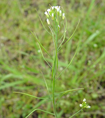 Arabidopsis thaliana aus engl. Wikipedia Bild von :nl:Afbeelding:Zandraket.jpg.